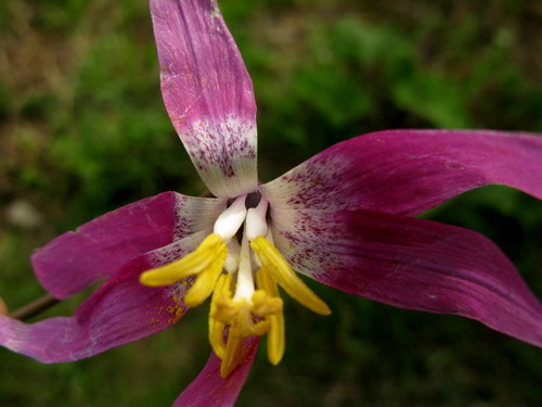 Внутренние элементы цветка кандыка сибирского.